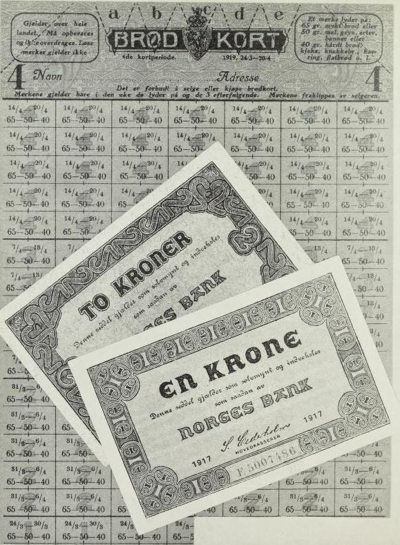 Rasjoneringskort for brød, 1919. Innfelt: Skillemynt av papir. 1-krone ble kalt «bolsjevik» og 2-krone kalt «rødgardist».